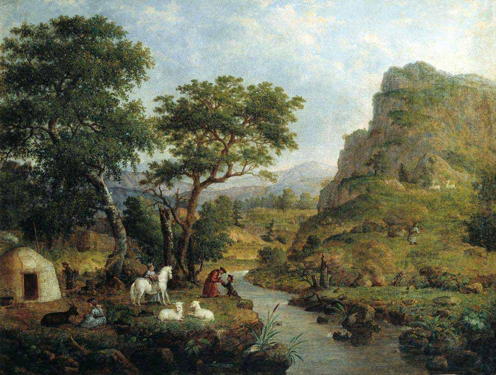 Легашев А. М. В горах Китая. Псковский государственный объединенный историко-архитектурный и художественный музей-заповедник